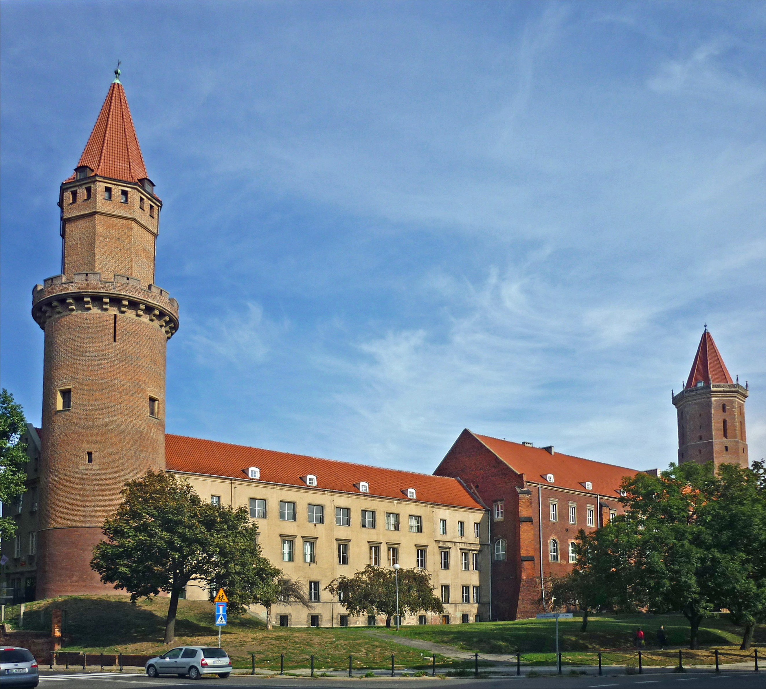 Piastenschloss in Liegnitz/Legnica